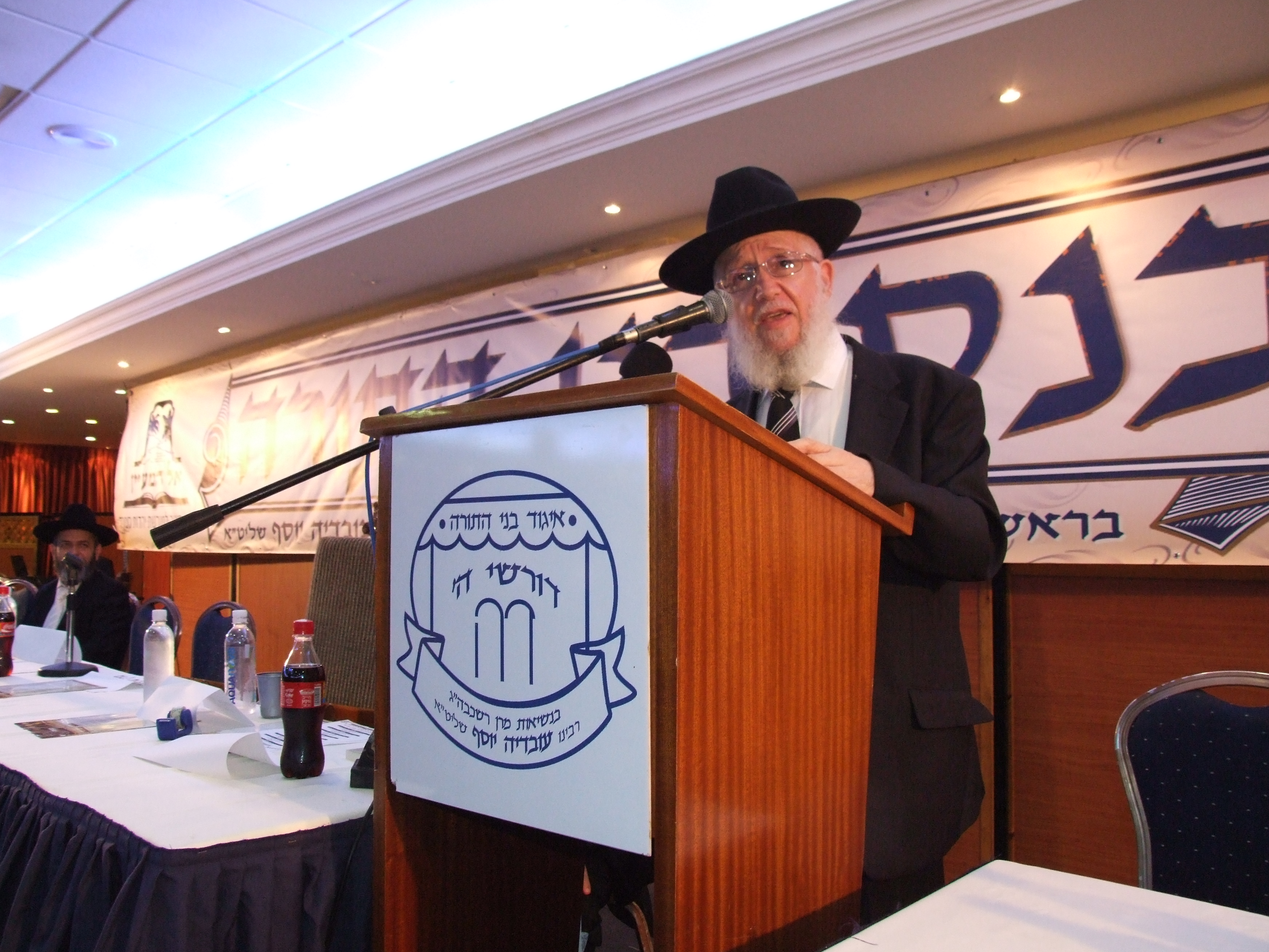 הרב צמח מאזוז נואם בכנס בני תורה